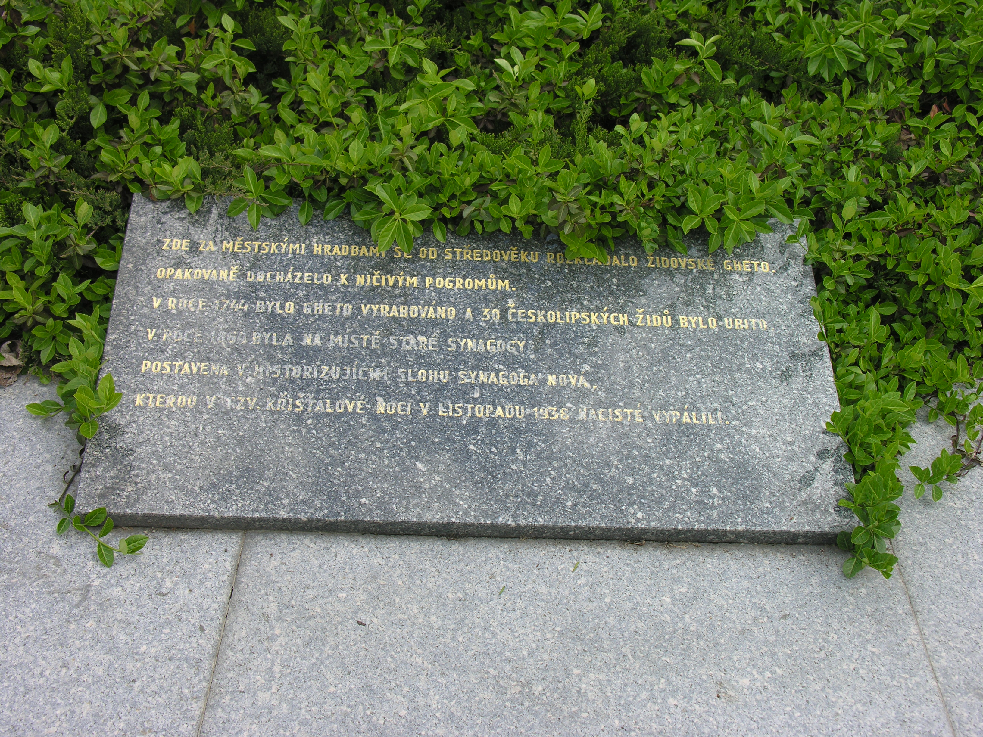 Tablica upamiętniająca synagogę w Czeskiej Lipie